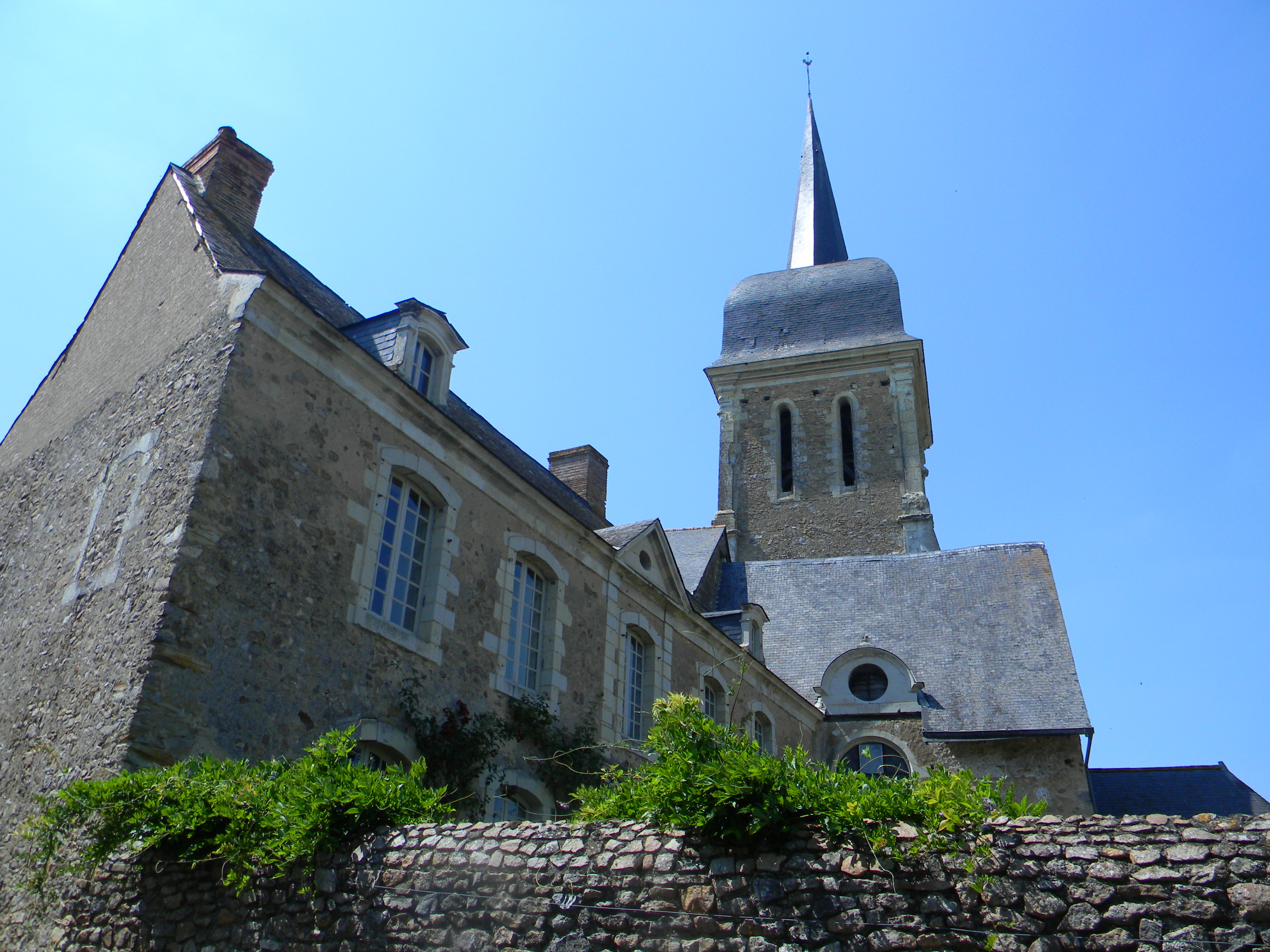 Inscrit à l'inventaire des monuments historiques, en 1965, au même titre que l'église Notre Dame de Brissarthe. Il a été construit, au XVIIIè siècle à l'emplacement du bras droit du transept de l'église. le clocher a été reconstruit, en 1730, sur les piliers du bras de transept gauche après que la foudre eut détruit le premier clocher